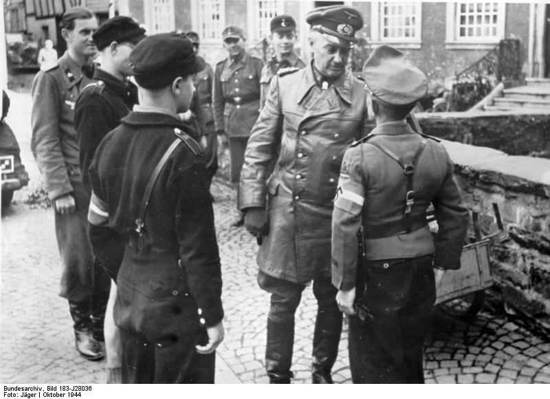 Deutschland, Model bei Hitlerjugend ADN-ZB II.Weltkrieg 1939-45 Faschistisches Deutschland: Der faschistische Generalfeldmarschall Model, Oberbefehlshaber einer Wehrmachtsheeresgruppe, spricht einem HJ-Führer seine Anerkennung für die von der faschistischen Hitlerjugend durchgeführte Schanzarbeit aus. Abgebildete Personen: Model, Walter: Generalfeldmarschall, Ritterkreuz (RK), Heer, Deutschland (GND 118582909)